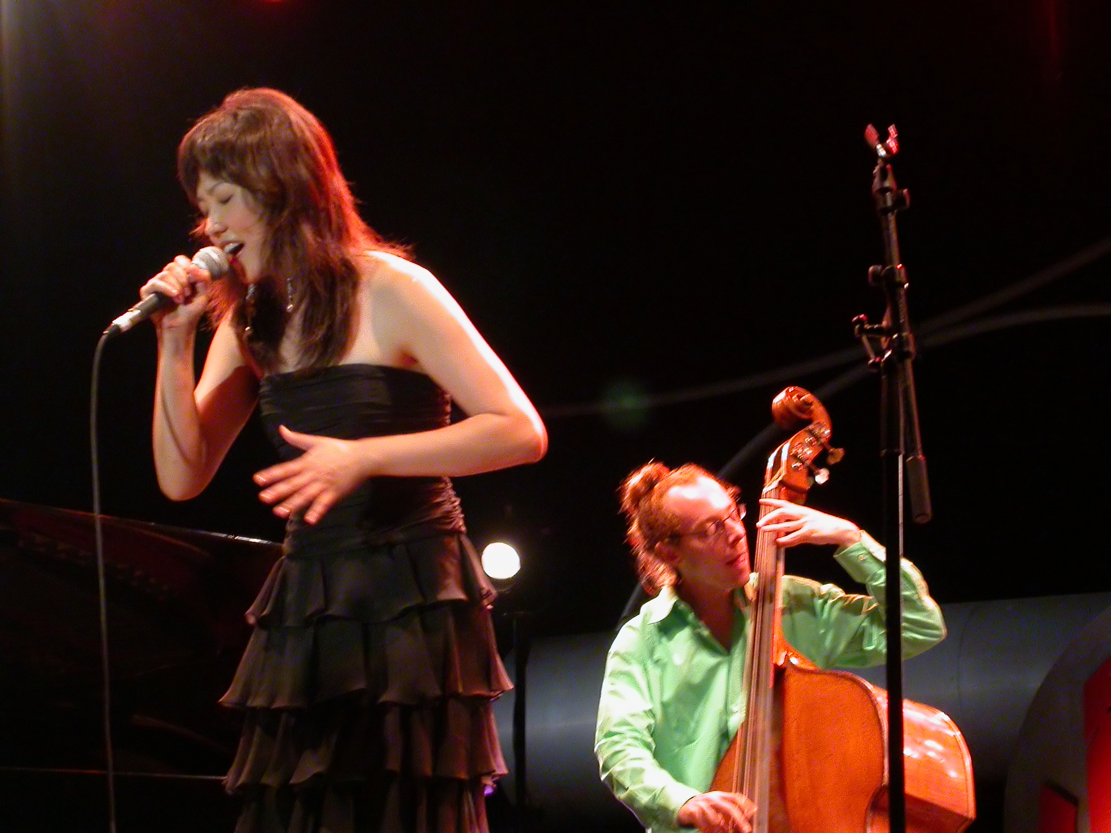 Youn Sun Nah, Jazz à Juan 2005, Juan-les-Pins, France